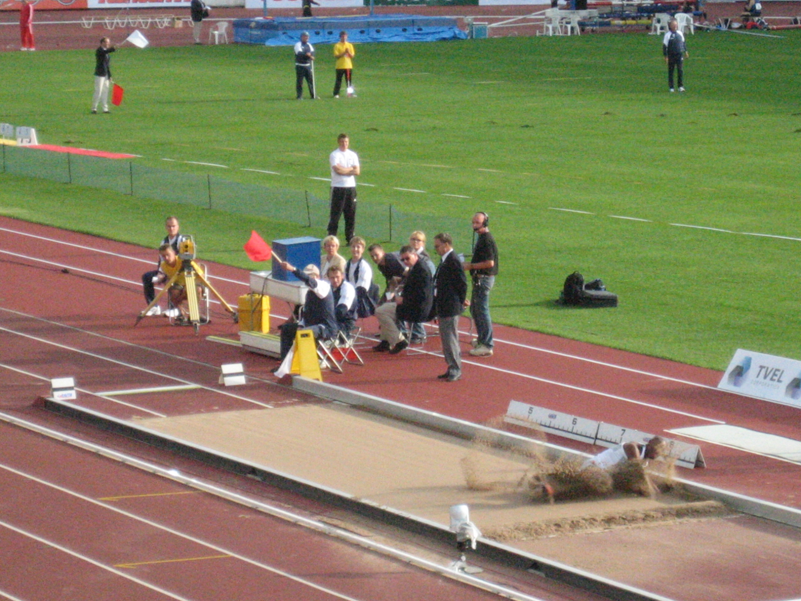 Punainen lippu nousee hylkäämisen merkiksi pituushypyssä Helsingissä 25.7.2005 GE Money Grand Prixissä.